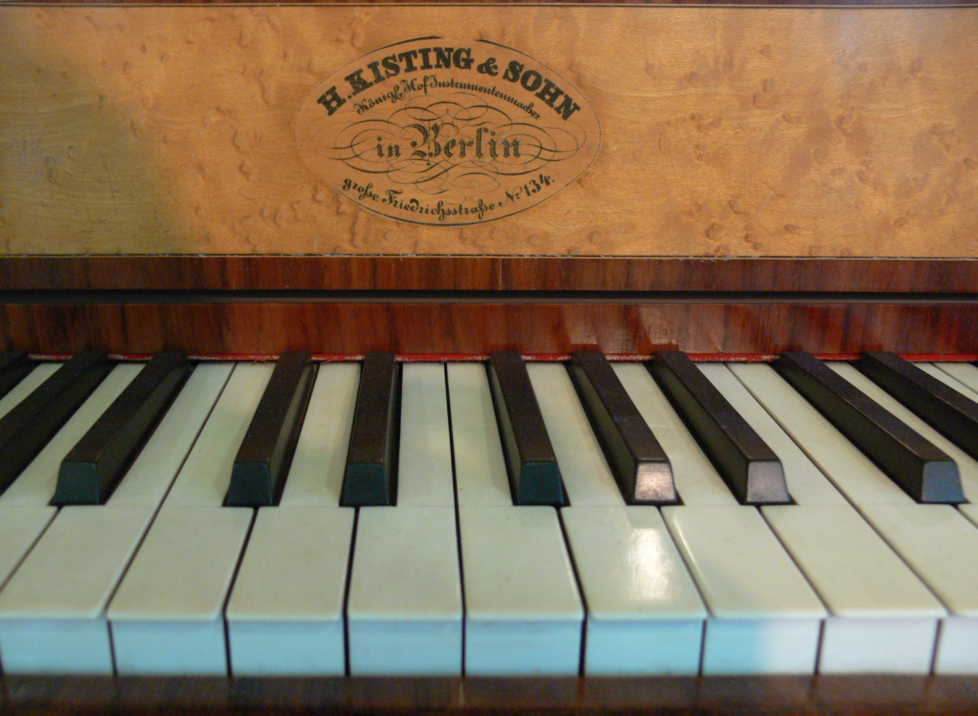 Hammerflügel, Heinrich Kisting & Sohn, Berlin, vor 1837, Detail Musikinstrumentenmuseum Berlin